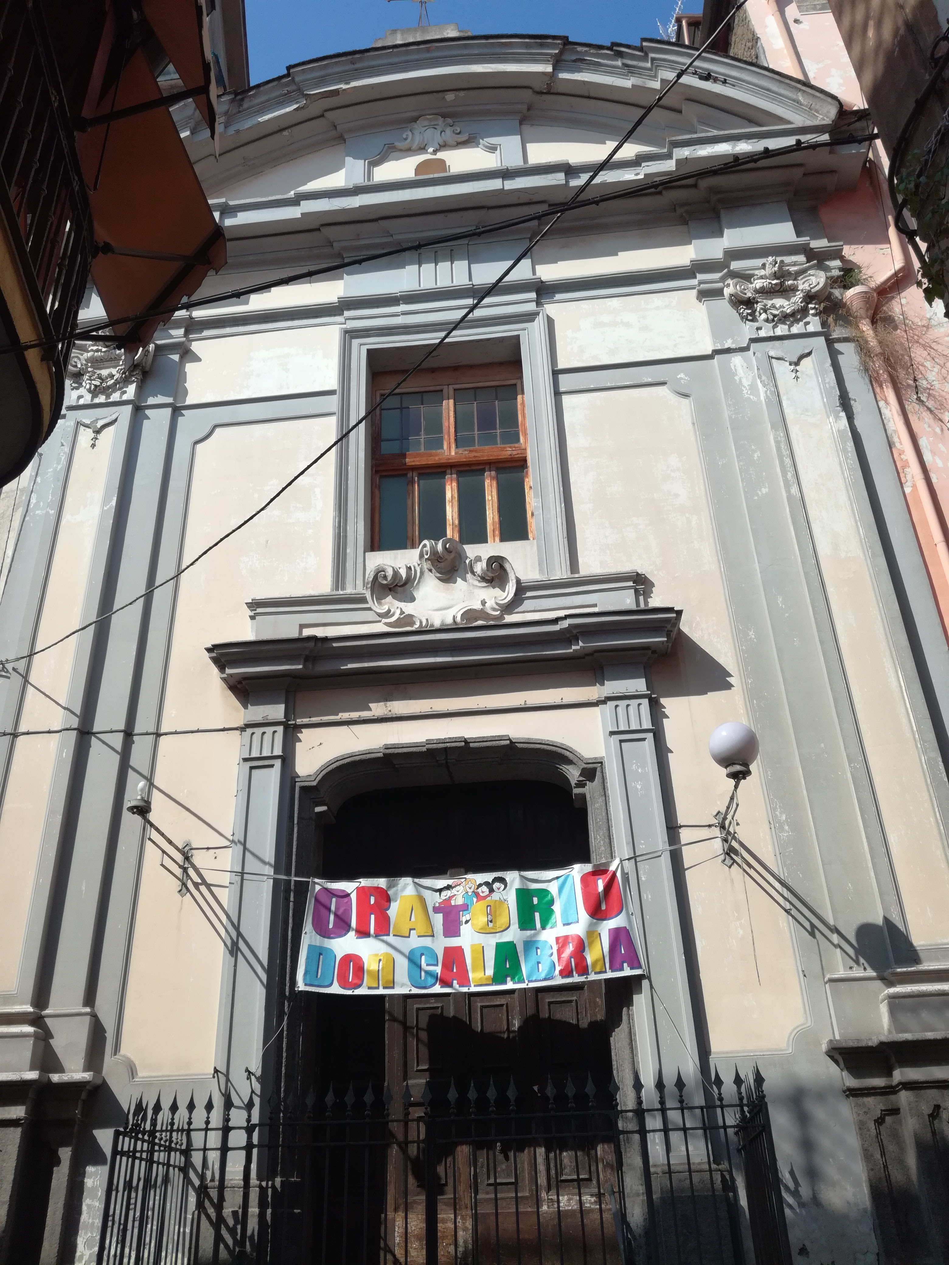 Esterno Santa Maria Avvocata dei Peccatori